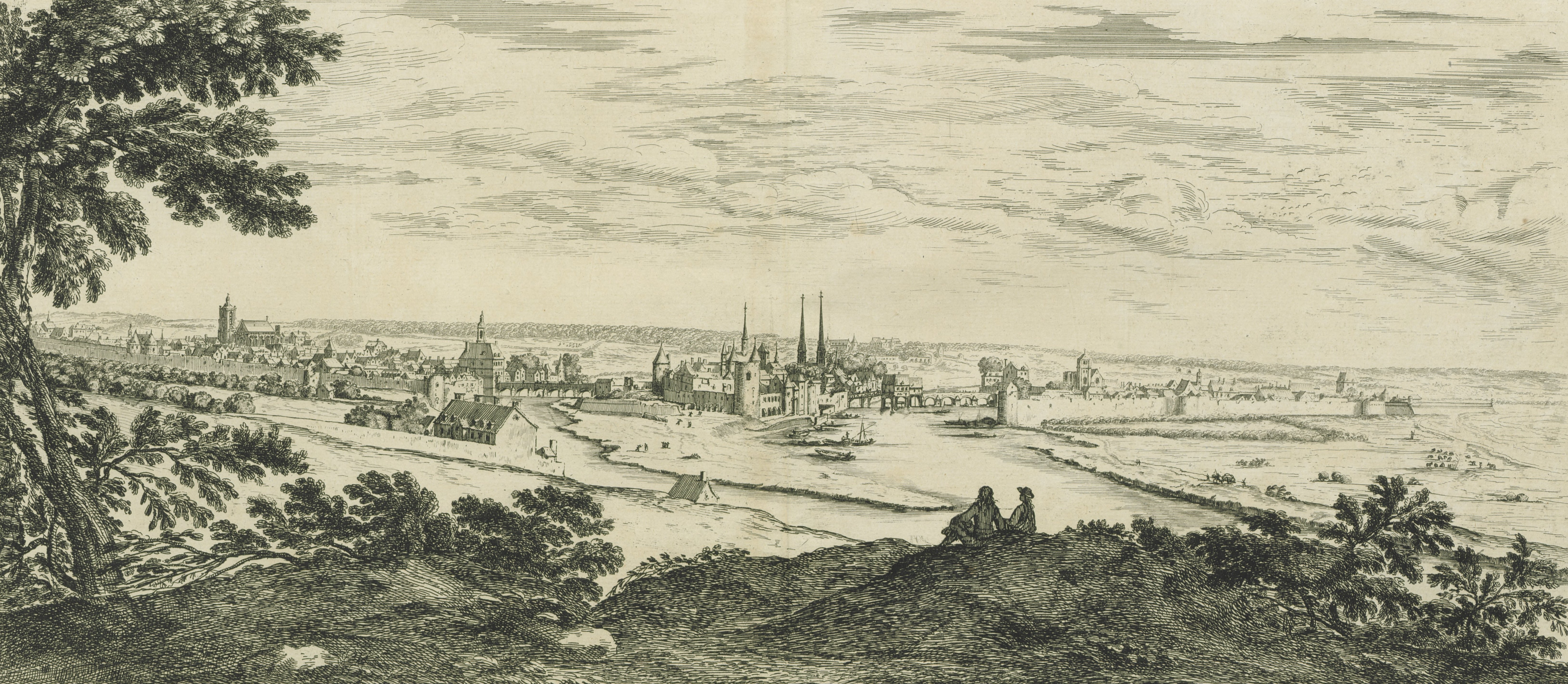 Profil de la Ville de Melun.